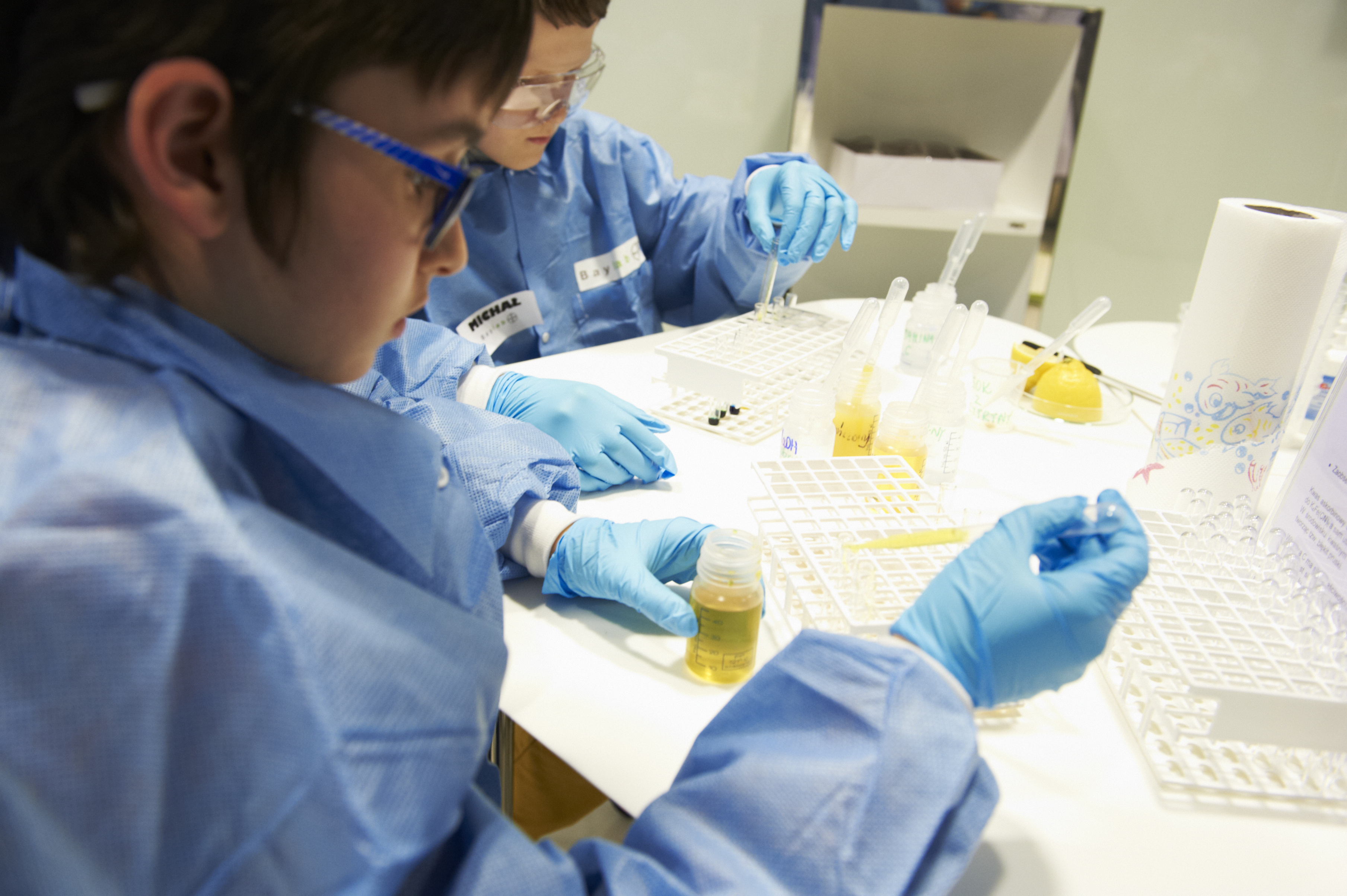 warsztaty